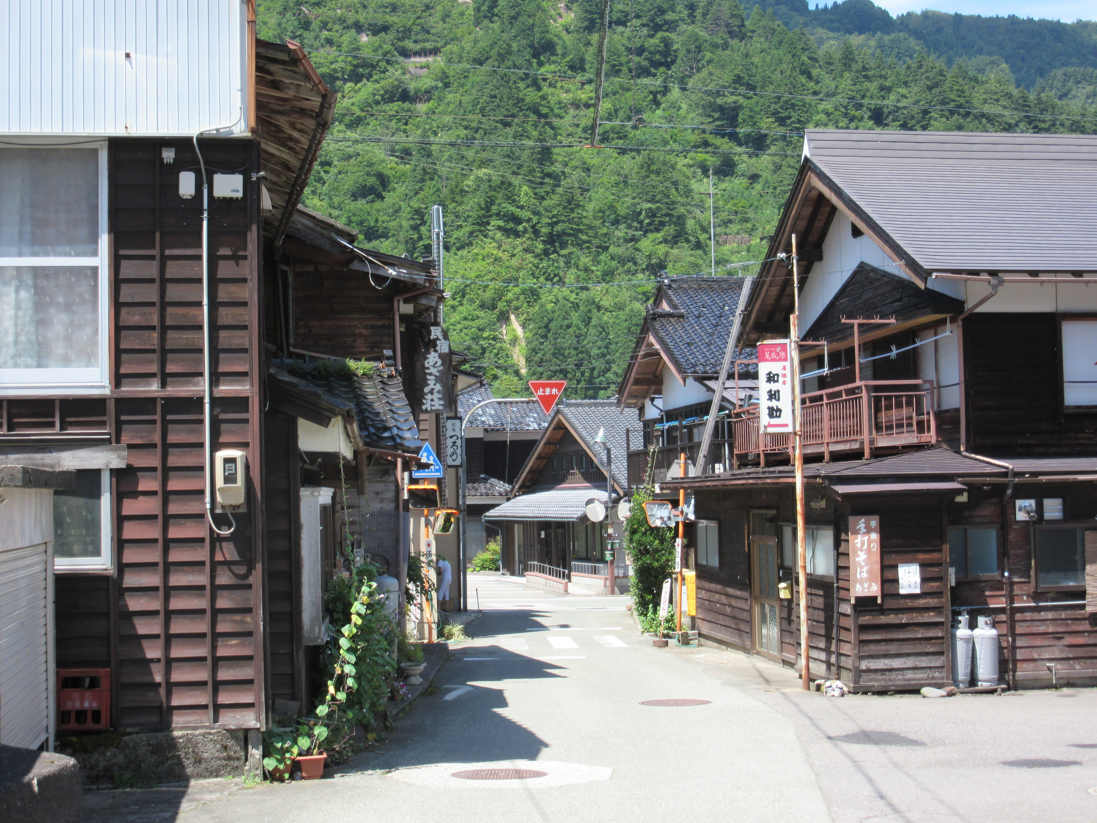 白峰の街並み